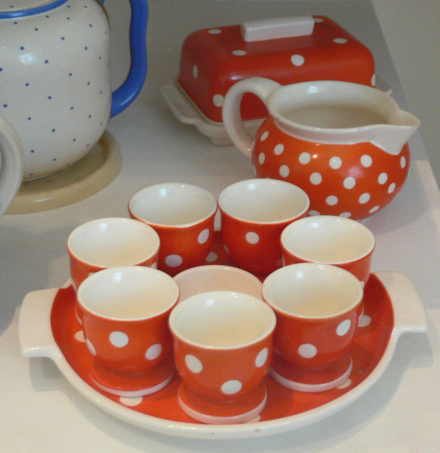 Eierbecher mit Tablett, Steingut lasiert, bemalt, Waechtersbach; 1930er Jahre Landesmuseum Württemberg (Außenstelle Museum für Volkskultur in Württemberg, Waldenbuch) 2.2, Inv. Nr. VK 1989/343-1-9